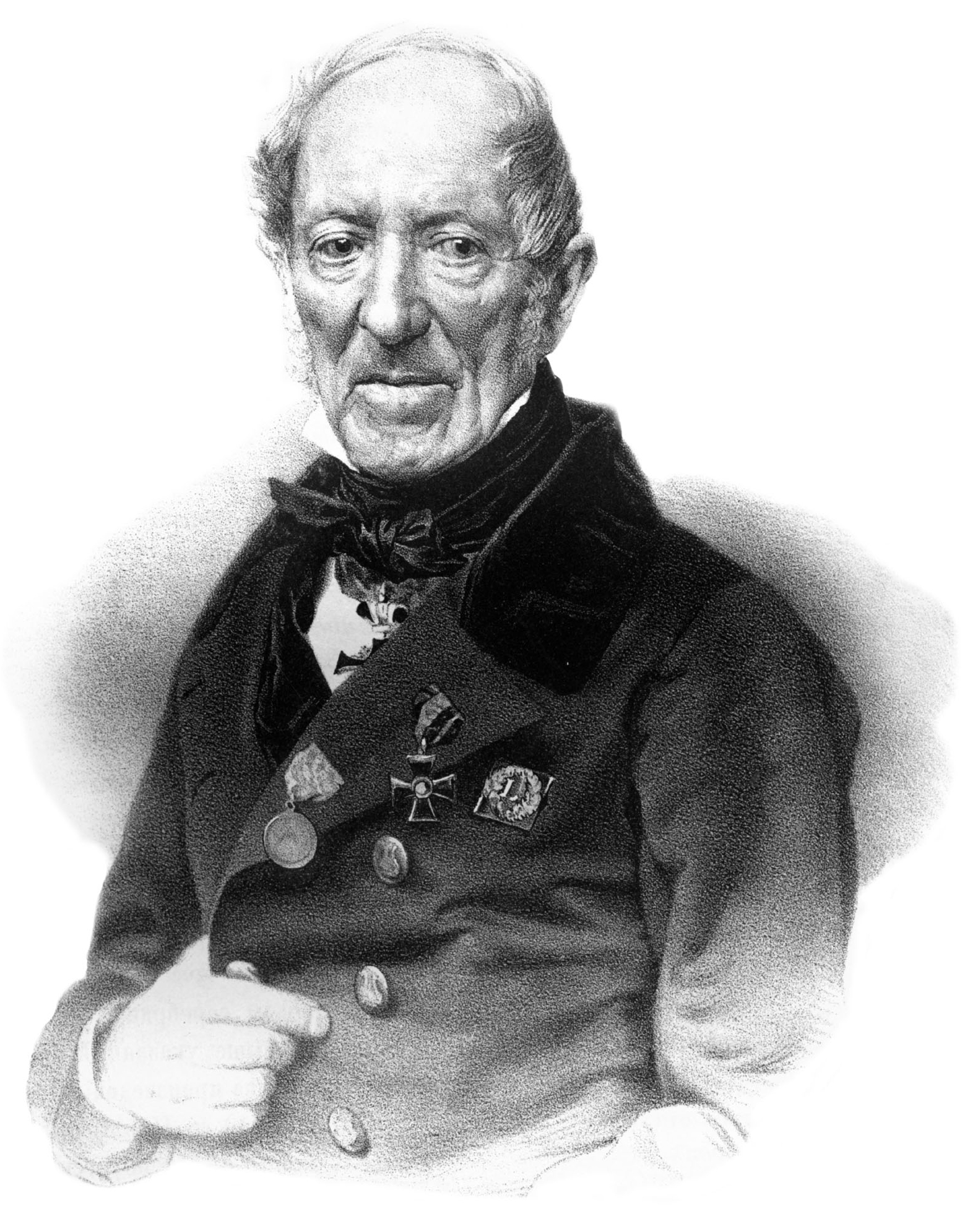 N. OUTKINE. Съ Фотографiи Художника Деньера. Лит. А. Мюнстера, СПБ. Imp. Lith. A. Munster (Editeur)